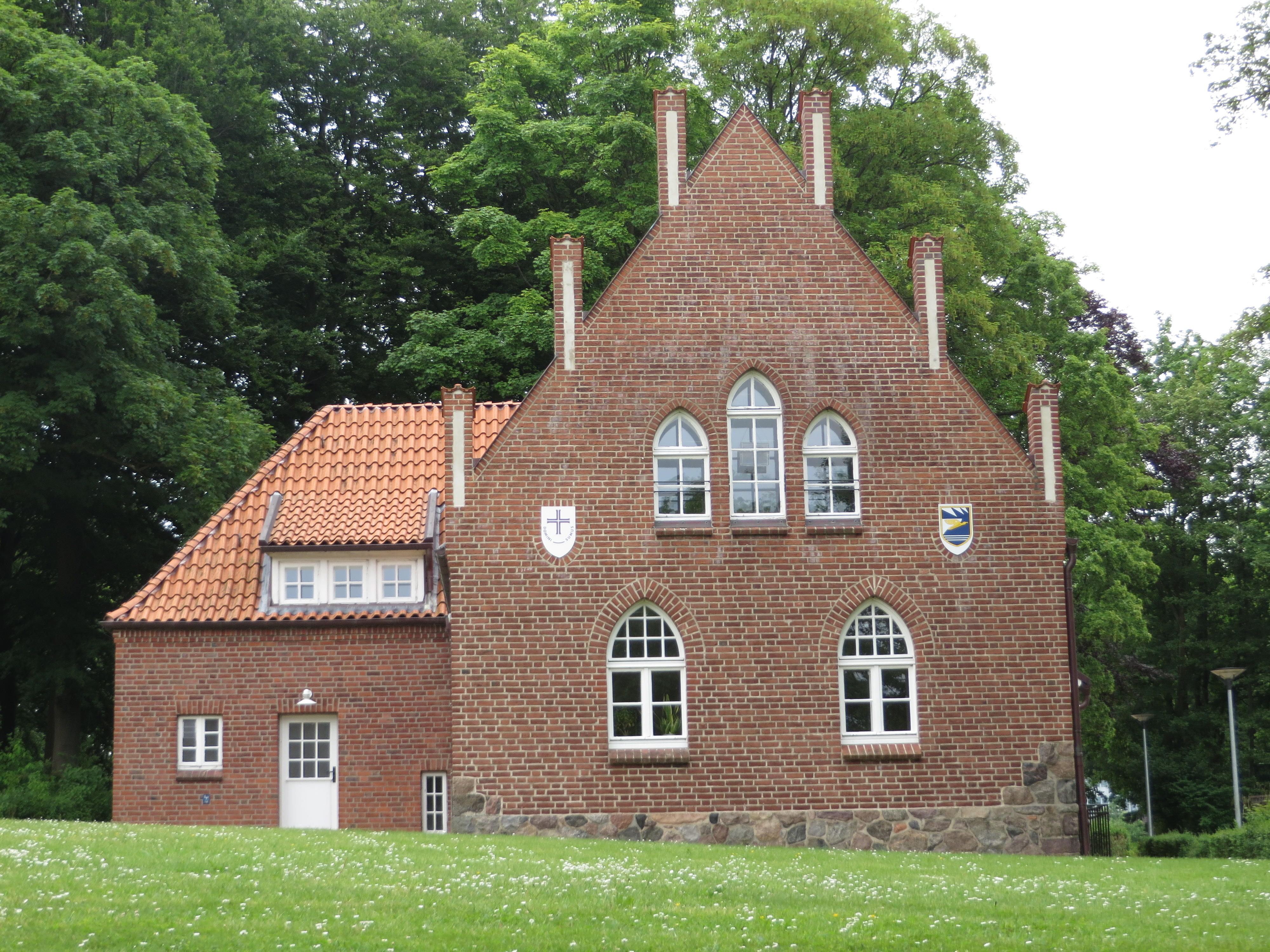 Giebelseite mit Wappen vom Gorch-Fock-Haus (Flensburg-Mürwik Juni 2015)